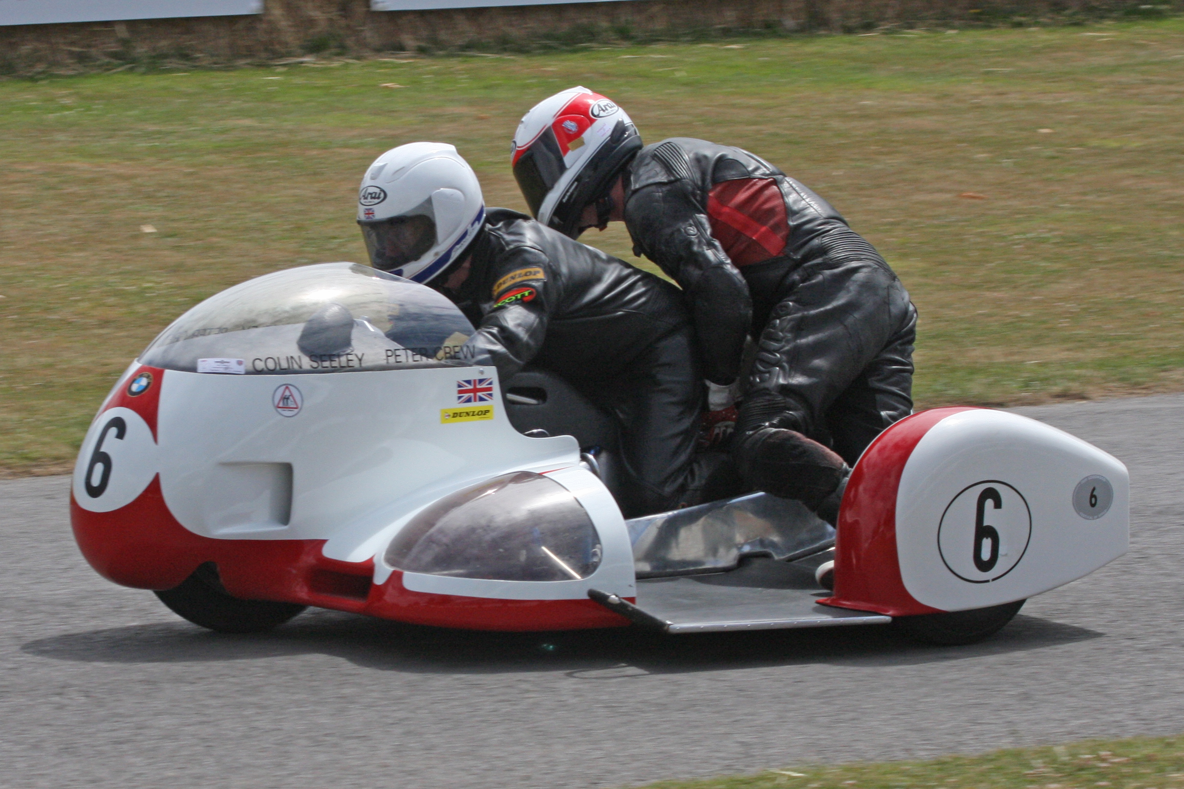 1968 BMW 750 Sidecar